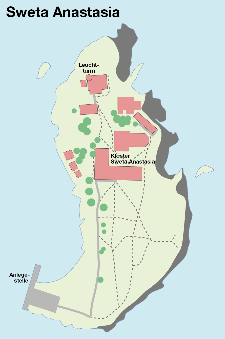 Karte der bulgarischen Insel Sweta Anastasia